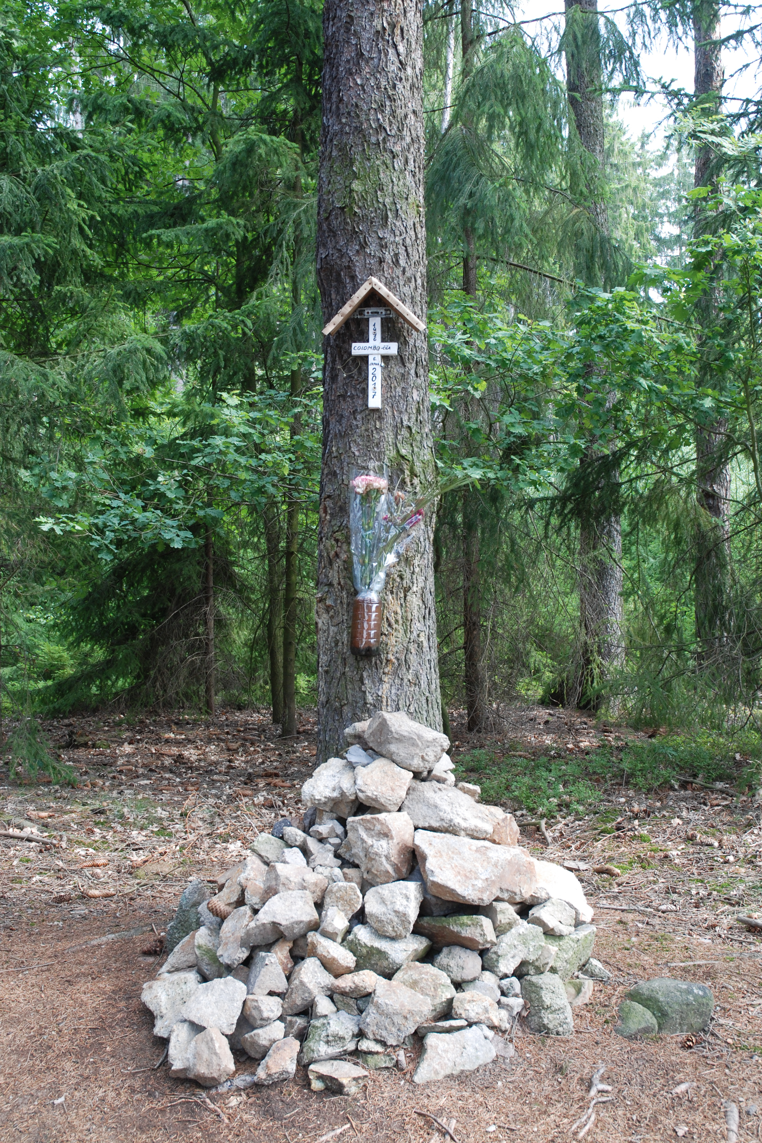 Vzpomínkové místo v karlovarských lázeňských lesích – křížek poblíž chaty Na Skalce